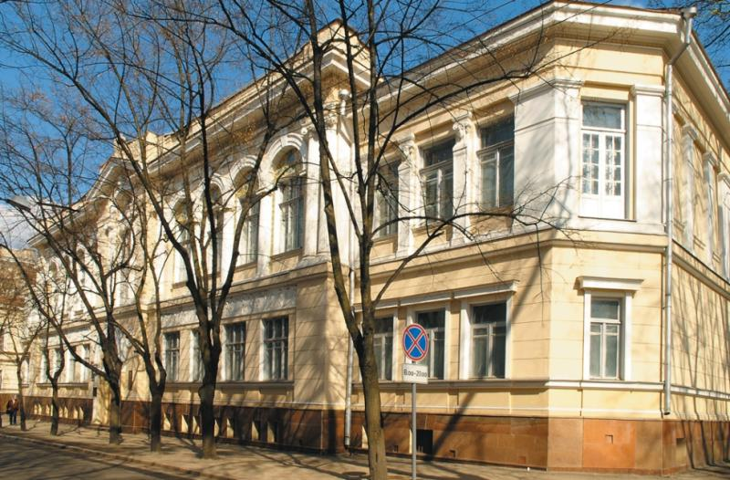 Здание Харьковского художественного музея